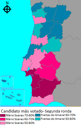 Resultados das eleições presidenciais portuguesas de 1986 - Segunda volta